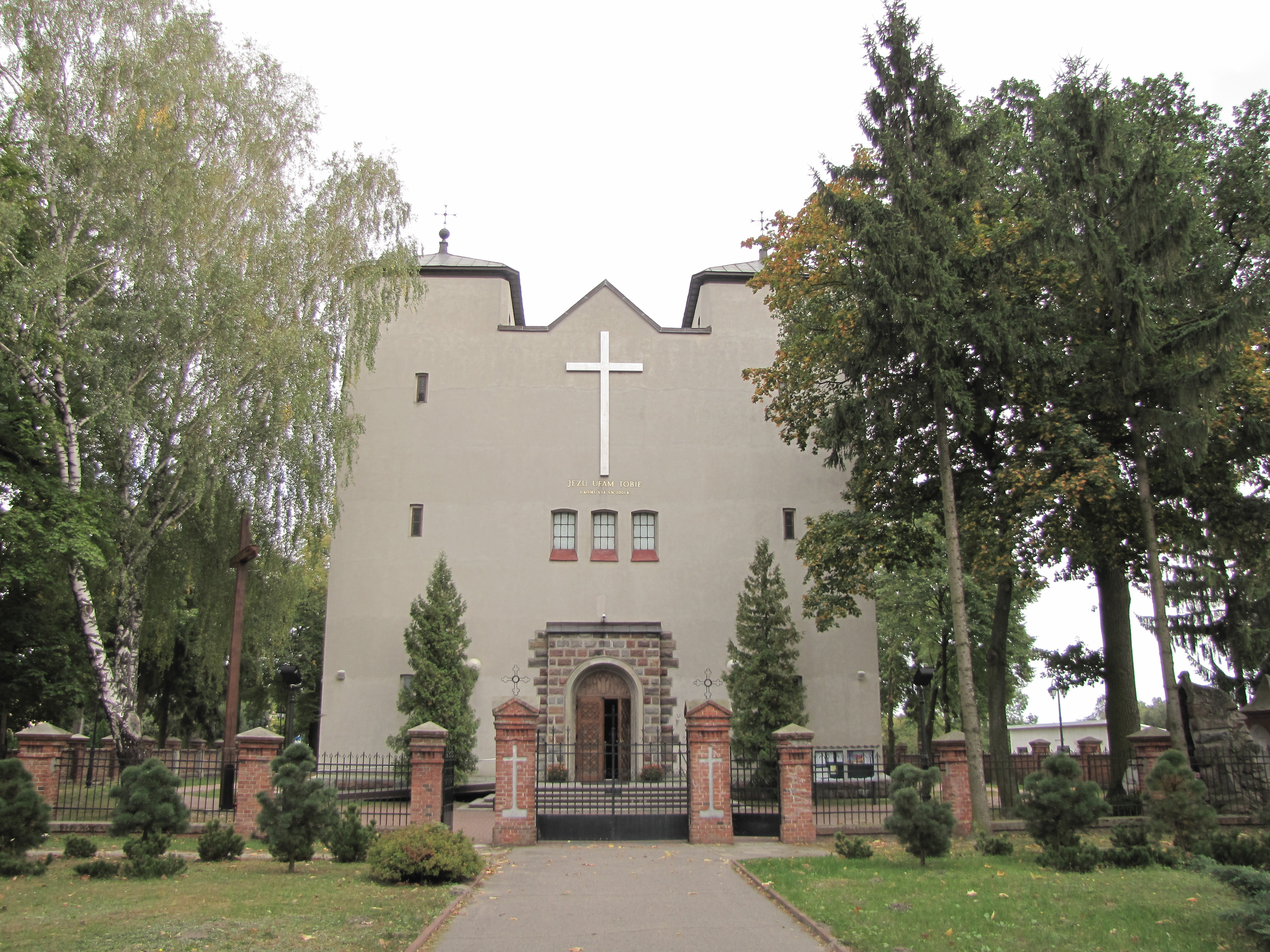 Kościół par. p.w. Przemienienia Pańskiego (1937-50) i Plebania (2 poł. XIX) Wisznice